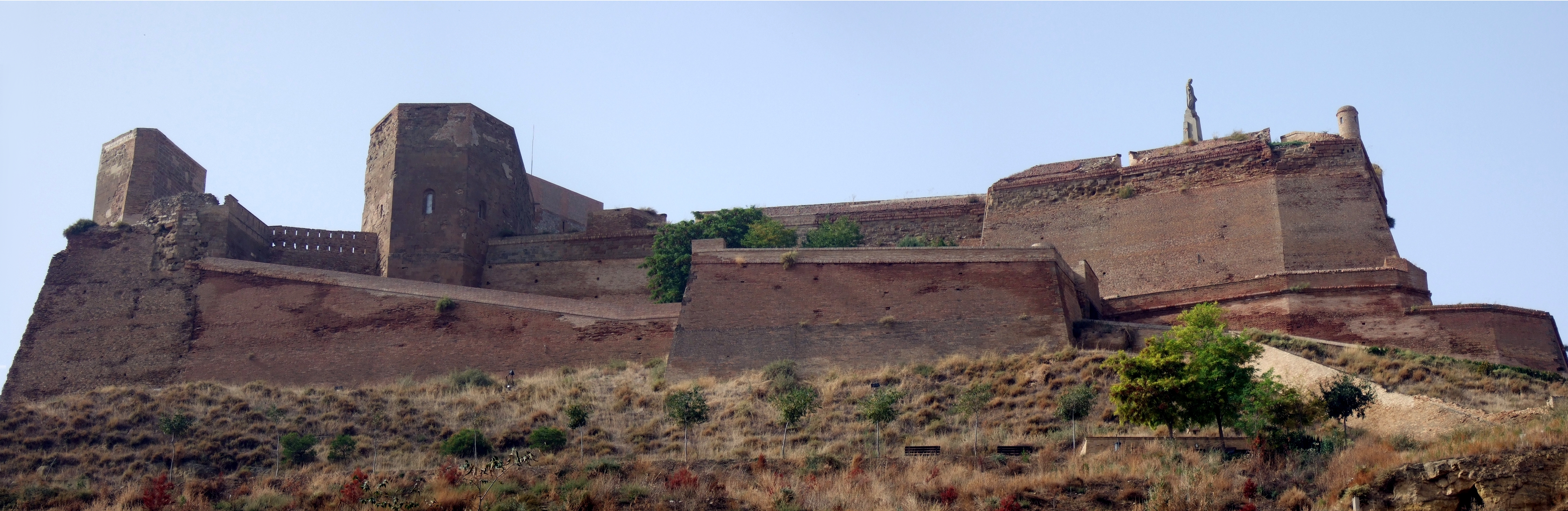 Castillo de Monzón